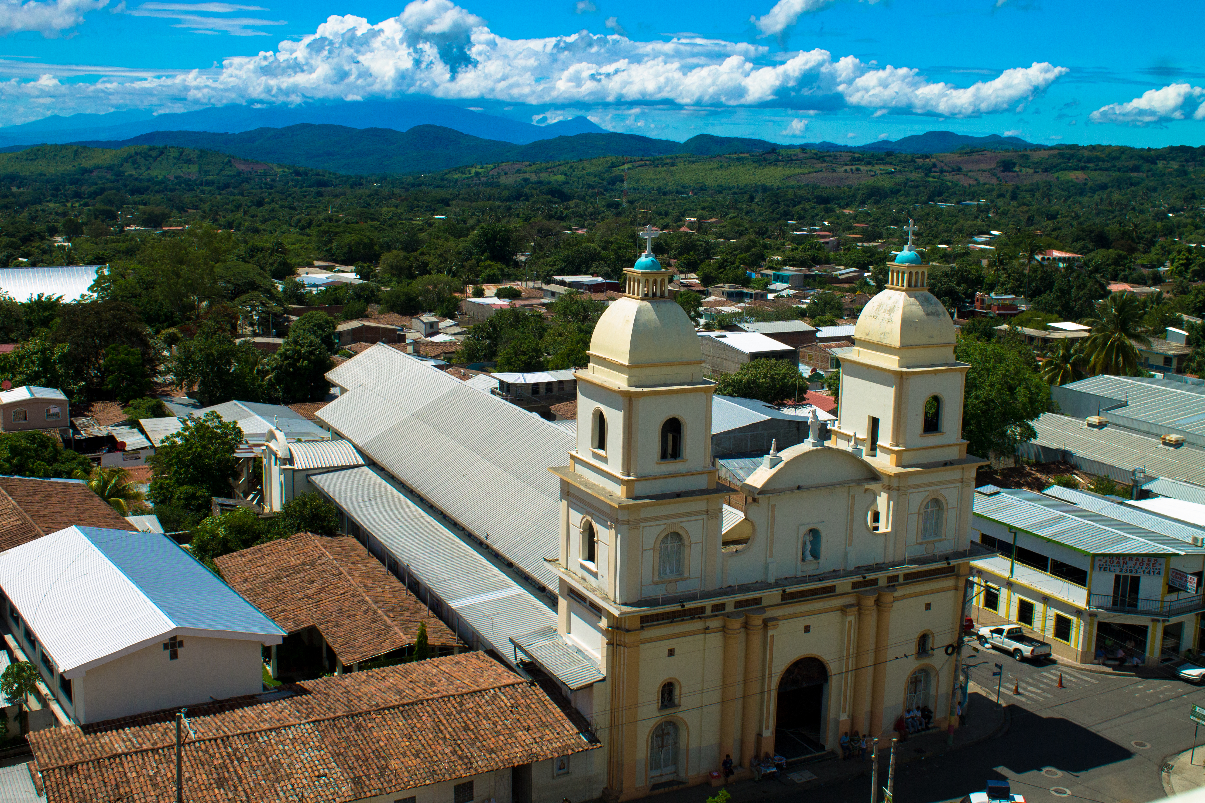 La Catedral de San Vicente posee un diseño peculiar tanto dentro como por fuera.